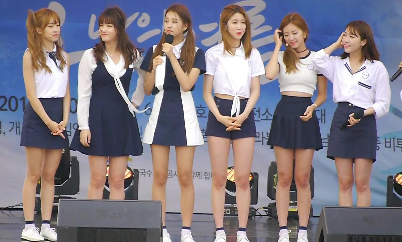 160708 안산 시화 조력발전소 당신의 아침 박은영 입니다 공개방송 라붐 직캠 상상더하기 개인기